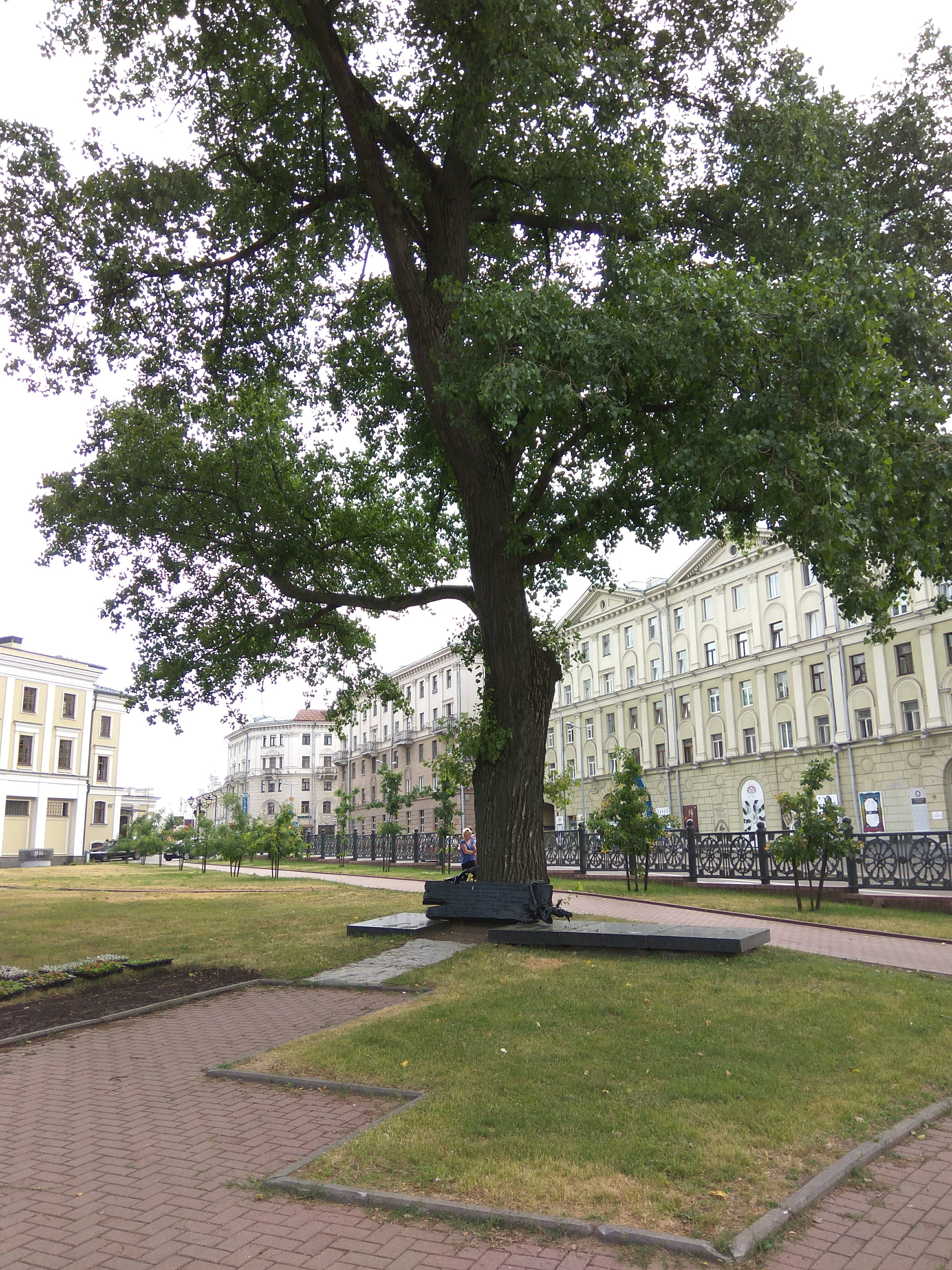 Мінск. Аляксандраўскі сквер. 2018